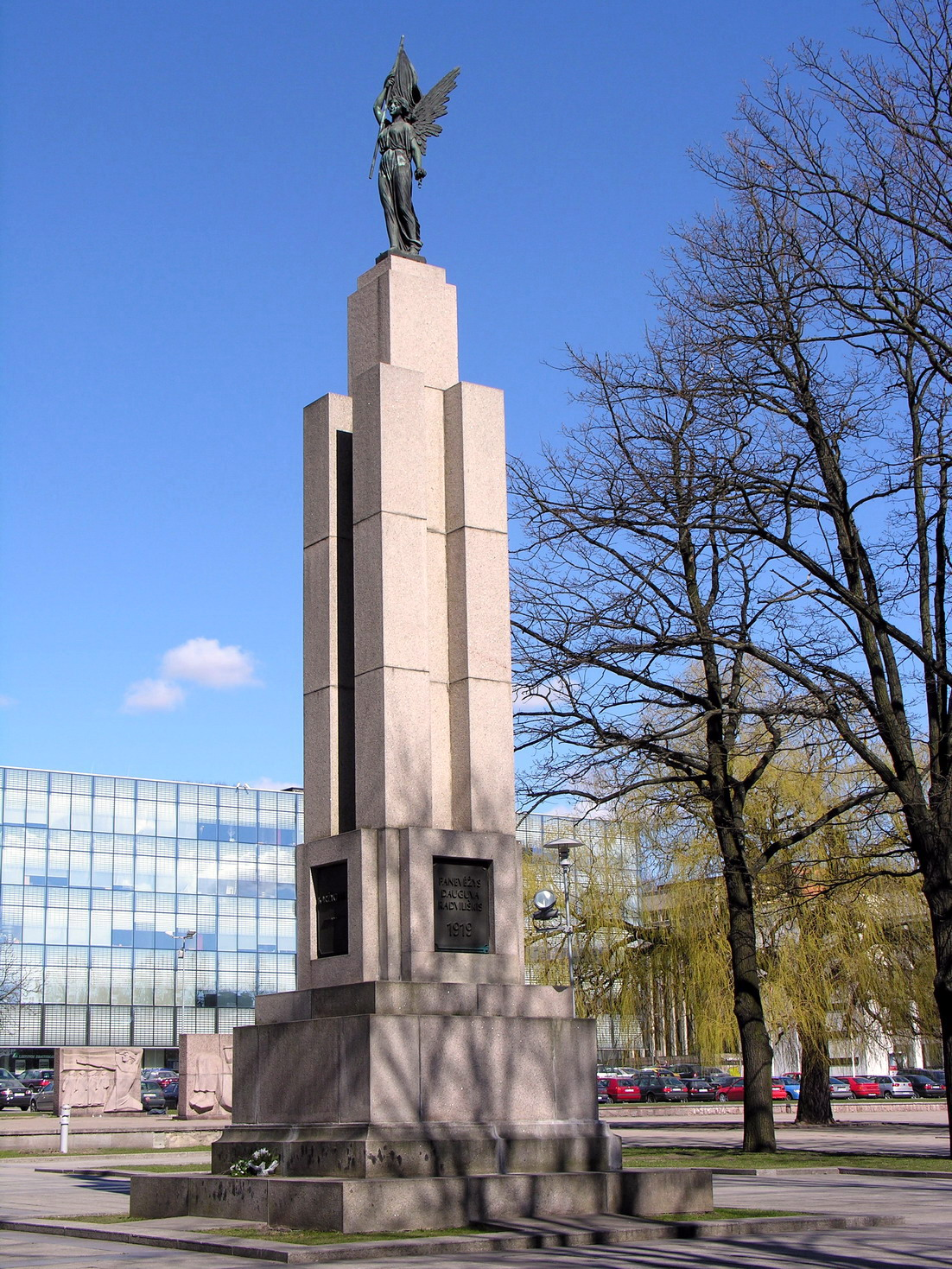 Laisvės statula Karo muziejaus sodelyje, Kaunas.